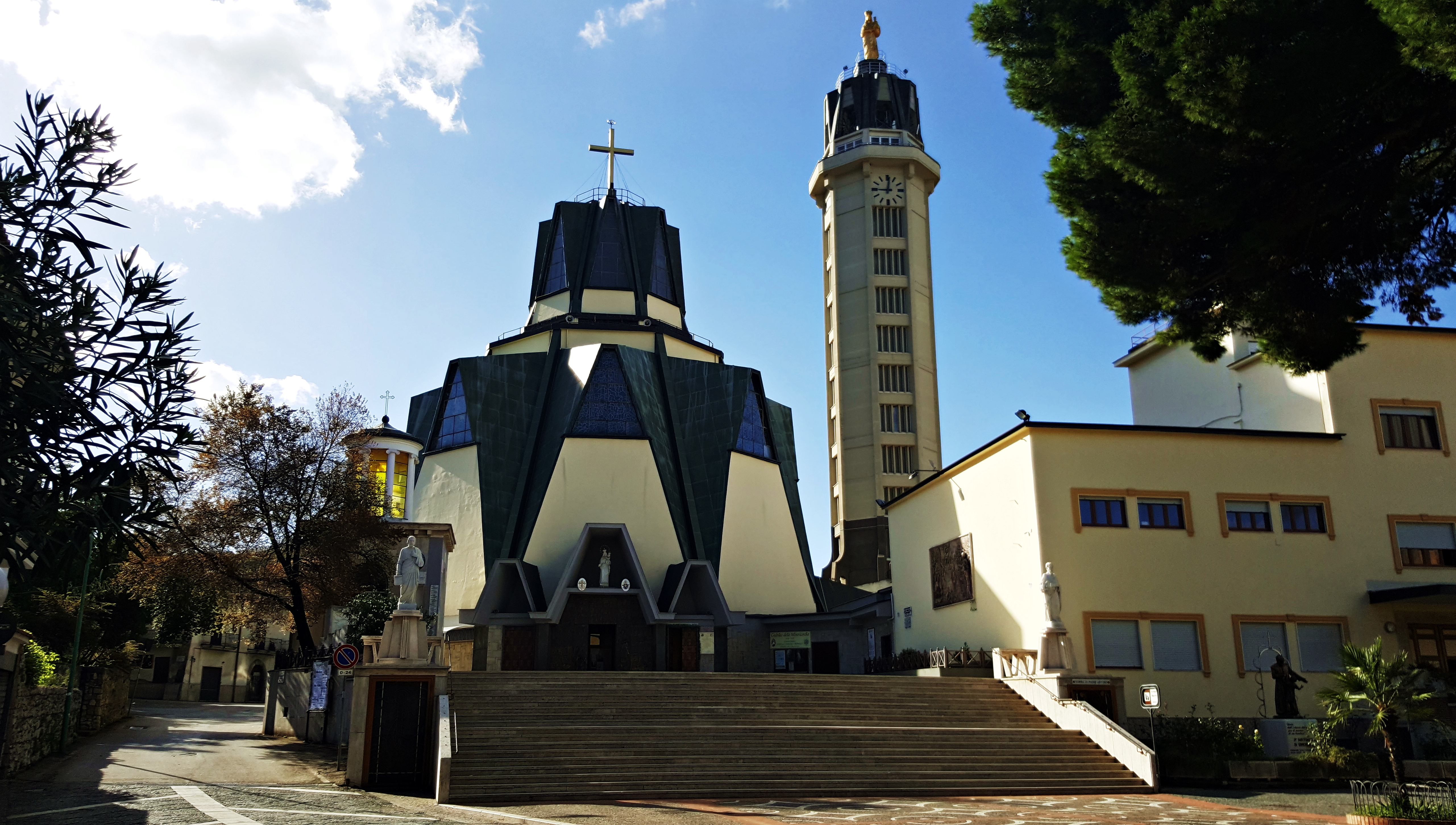 Basilica di Maria Santissima Consolatrice del Carpinello This is a photo of a monument which is part of cultural heritage of Italy.